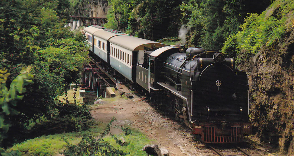 รถจักรไอน้ำแปซิฟิค CX50 หมายเลข 850 ขณะทำขบวนนำเที่ยวทางรถไฟสายมรณะ ผ่านสะพานถ้ำกระแซ, จังหวัดกาญจนบุรี เมื่อปี พ.ศ. 2541